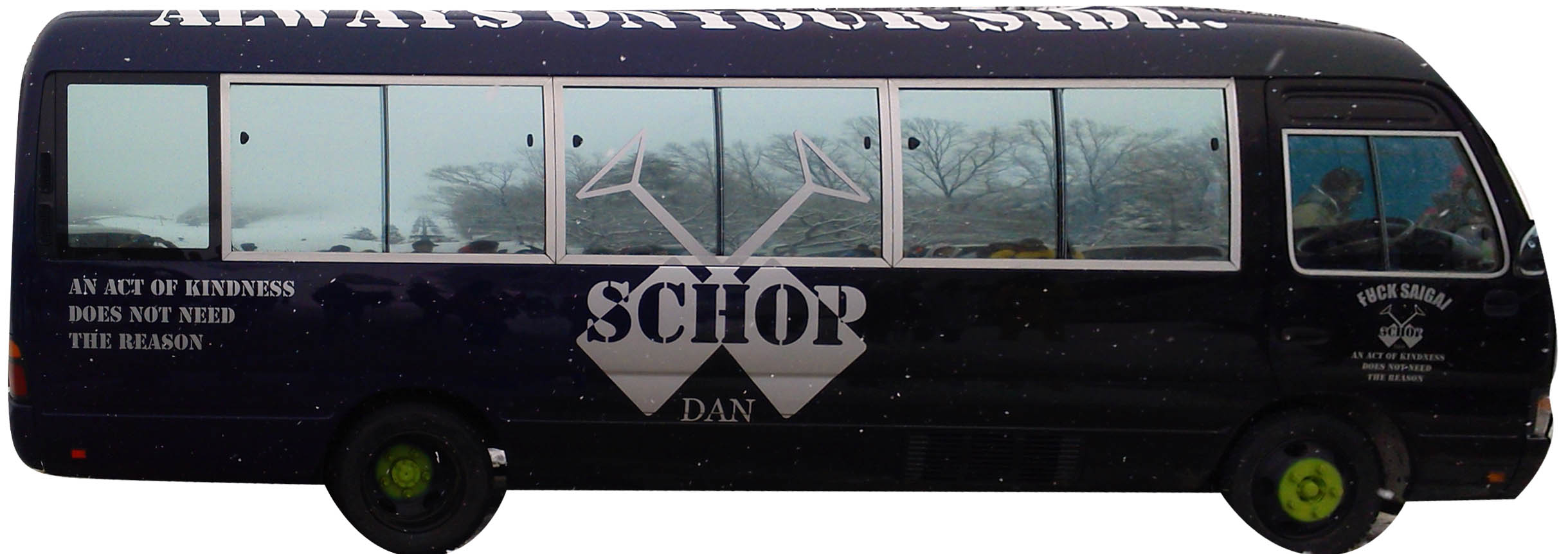 スコップ団バス